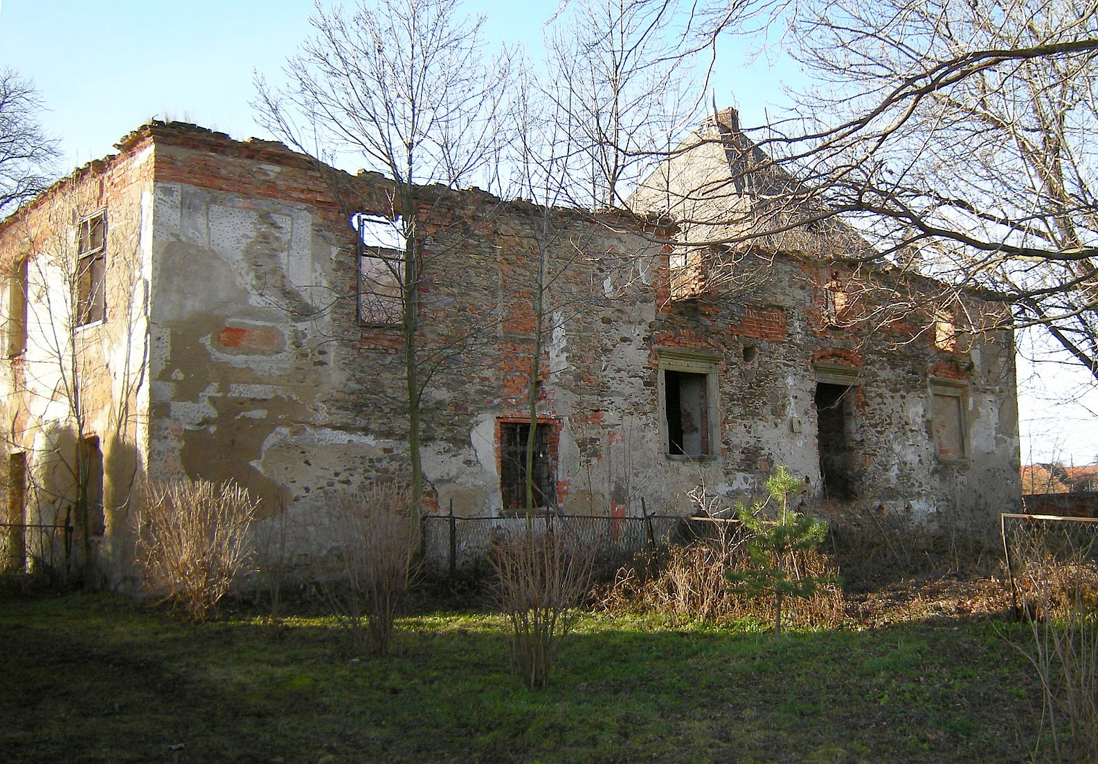 Ruina dworu w zespole dworskim Lisie Kąty, Paczków 06.1964.